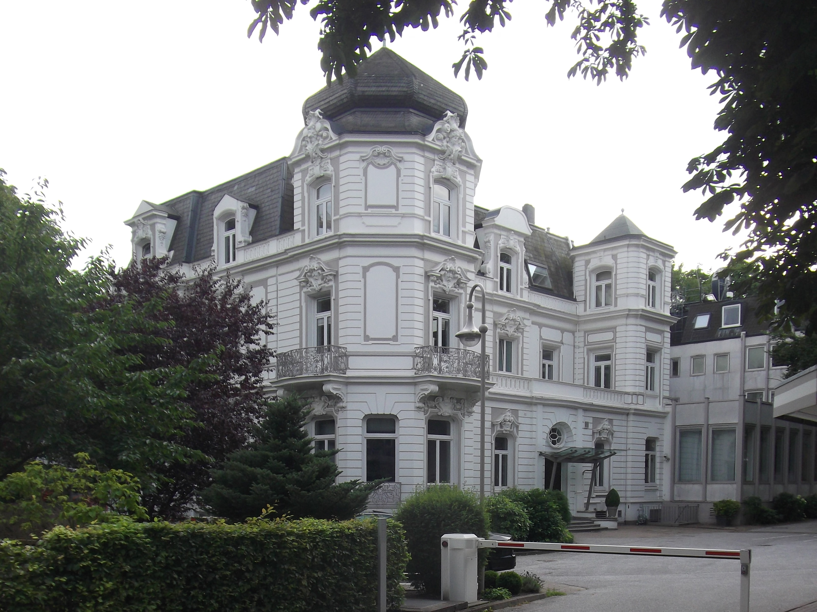 Hamburg, August 2015